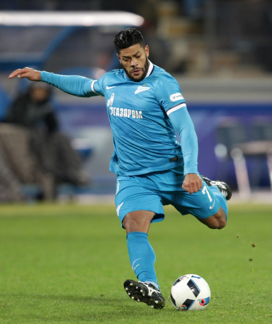 Халк в матче Зенит - Кубань